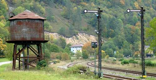 Description: Wasserturm der Donautalbahn bei Hausen im Tal - Gemeinde Beuron selbst fotografiert von Enslin am 9.10.2004 GNU-FDL history: de.wikipedia 18:42, 11. Okt 2004 . . Enslin . . 500x258 (37507 Byte) (GNU-FDL Wasserturm bei Beuron selbst fotografiert am 9.10.2004)